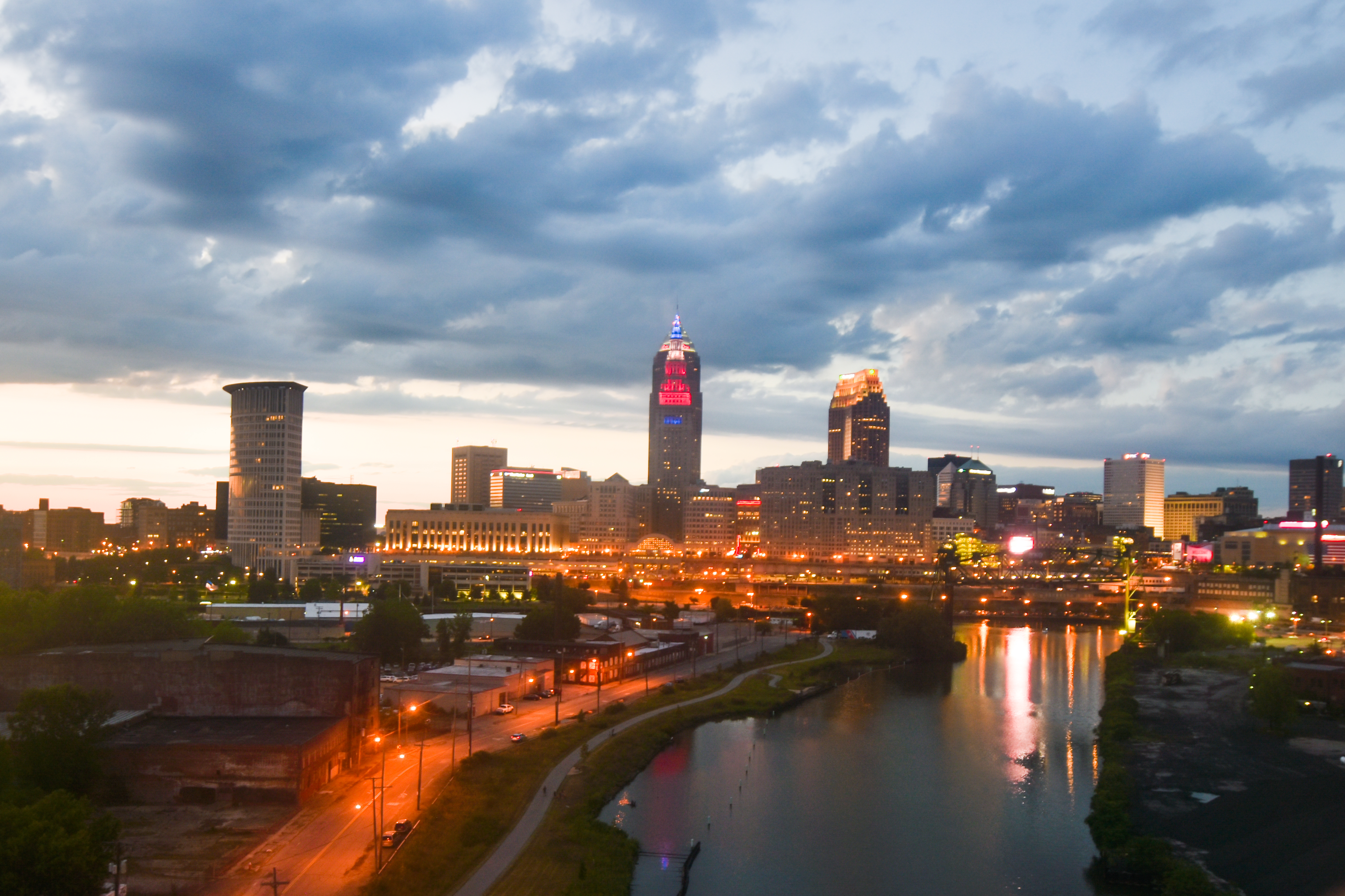 Cleveland Skyline